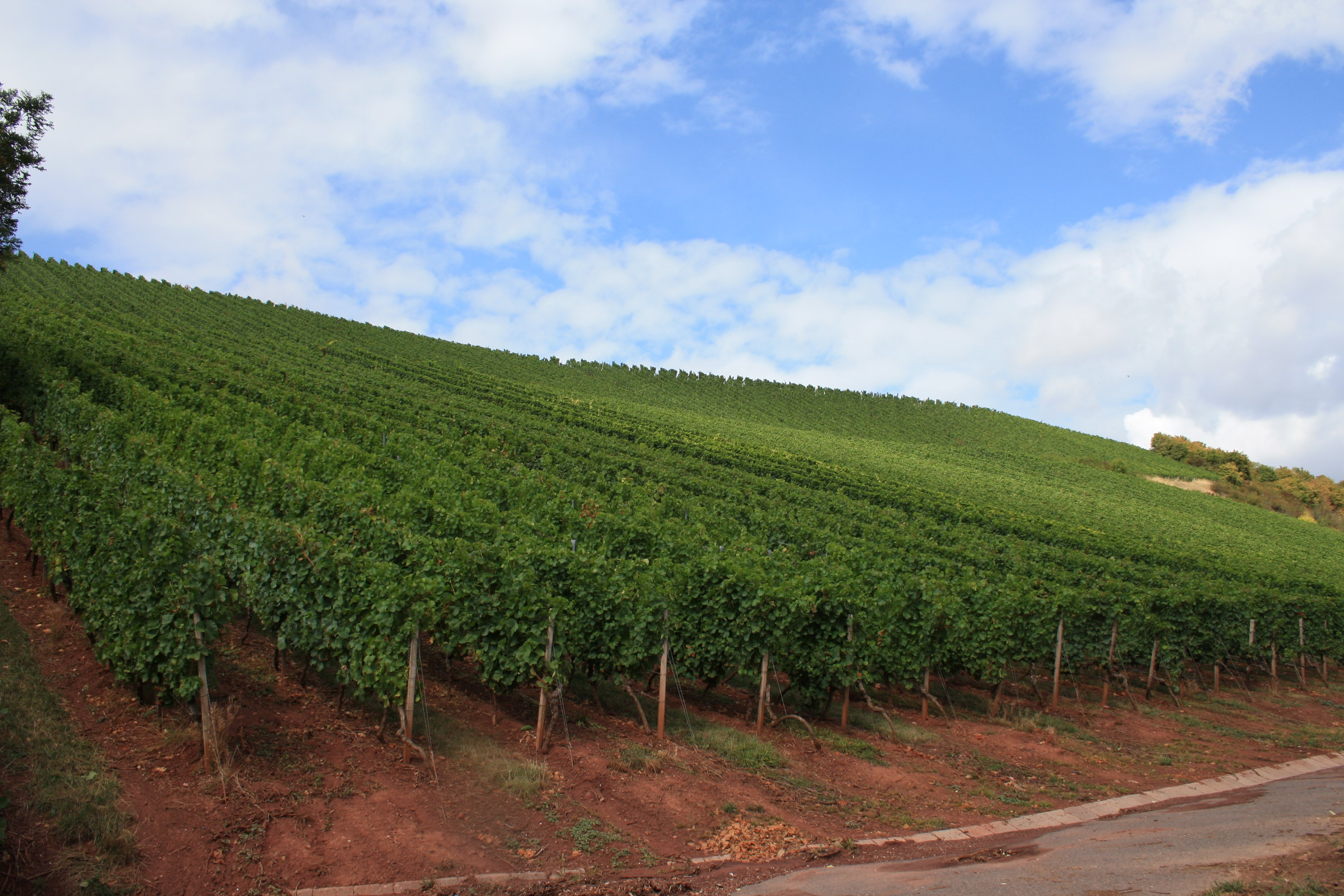 Weinberge Nierstein